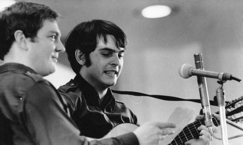 Berlin, Hartmut König Zentralbild / Katschorowski / 15.2.70 / Berlin: Erstes Festival des politischen Liedes. Ganz im Zeichen des Leninschen Gedankengutes und der Freundschaft zur Sowjetunion steht das Festival des politischen Liedes vom 15. -21.2.1970 in der Berliner Kongreßhalle. Während der Eröffnungsveranstaltung sangen Hartmut König (Foto), die Mitglieder des Singeclubs Hoyerswerda, Kurt Demmler, die "gruppe pasaremos" und der Berliner Oktoberklub, der mit dieser Veranstaltung das vierte Jahr seines Bestehens feierte. Abgebildete Personen: König, Hartmut: Stellvertretender Minister für Kultur, Lyriker, DDR